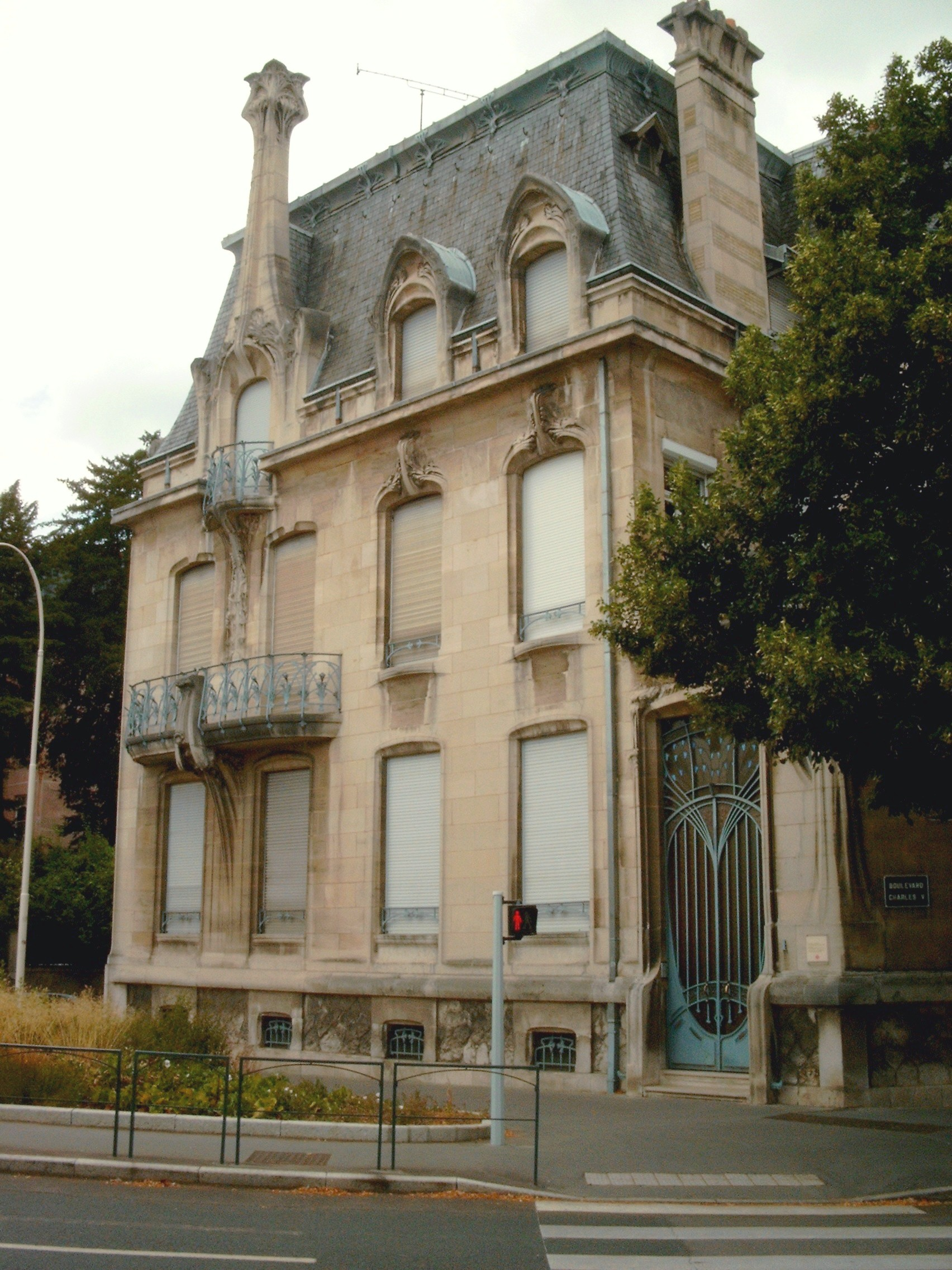 Maison Weissenburger Maison Art Nouveau de l'architecte Lucien Weissenburger à Nancy, réalisée par les plus grand artistes de l'École de Nancy. 1 boulevard Charles V 54000 Nancy This building is en partie classé, en partie inscrit au titre des Monuments Historiques. It is indexed in the Base Mérimée, a database of architectural heritage maintained by the French Ministry of Culture, under the references PA00106181 and IA54000031.